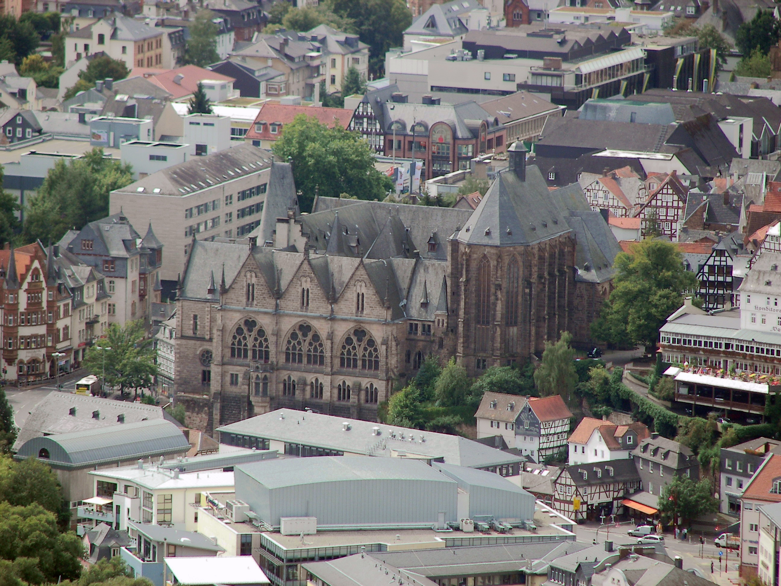 Marburg, Alte Universität, Blick vom Spiegelslustturm